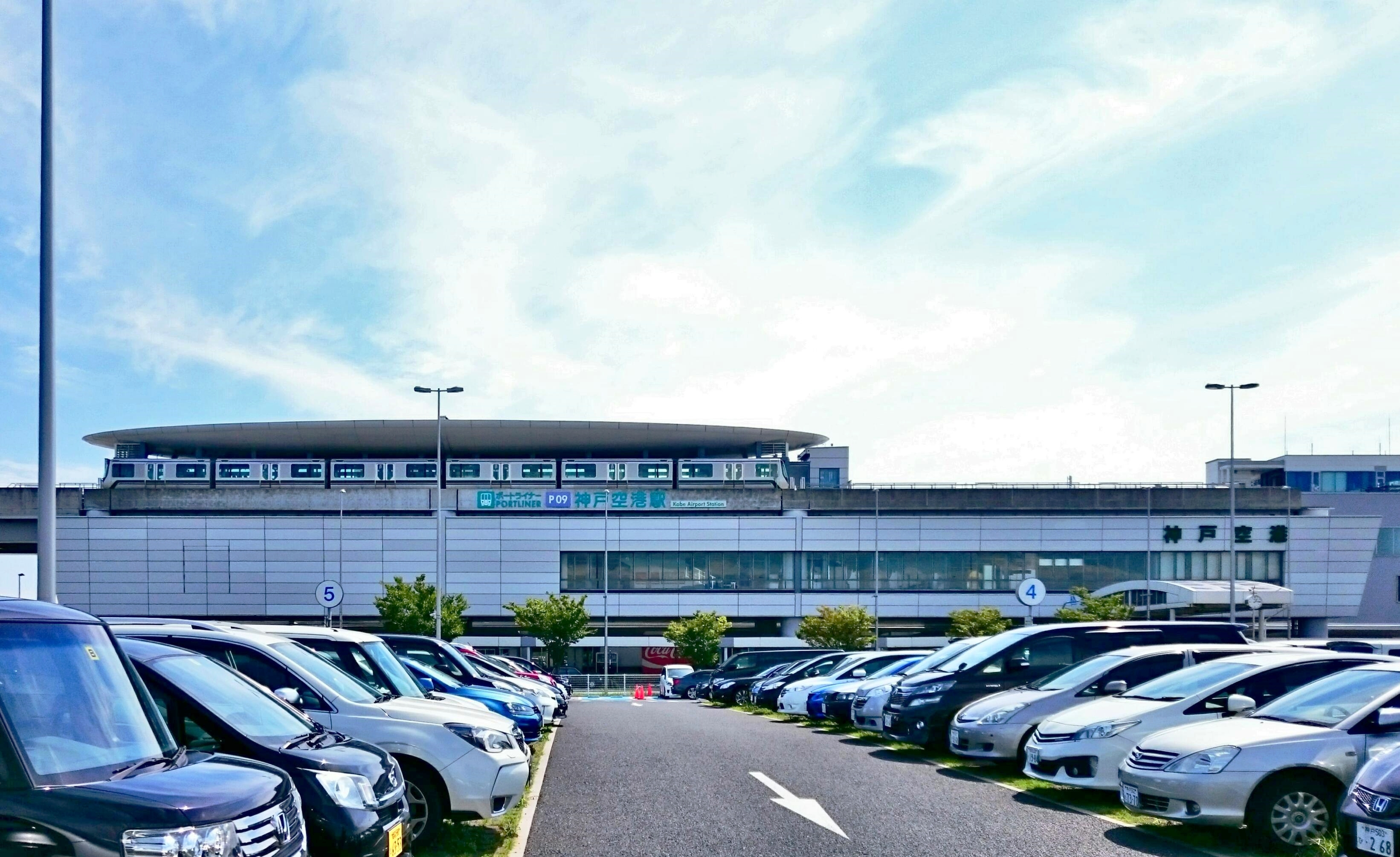 神戸新交通ポートアイランド線(ポートライナー) P09 神戸空港駅 北側からの駅舎